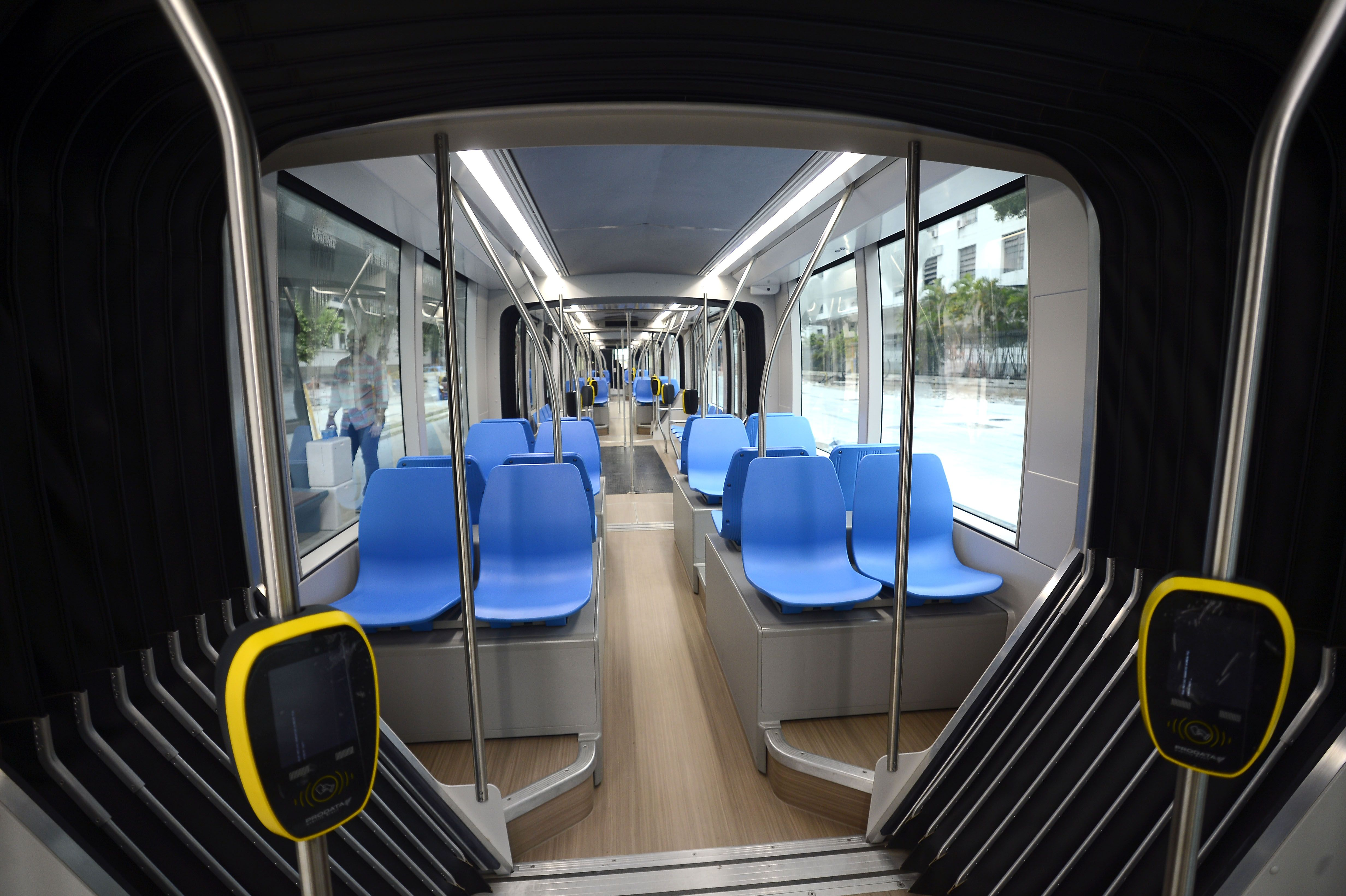 O Veículo Leve sobre Trilhos estacionado na Praça Mauá, Rio de Janeiro.